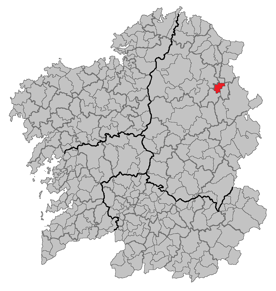 Mapa coa localización do concello de Meira.